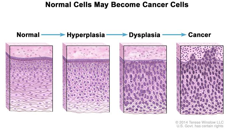 שינוי במורפולוגיה של רקמת השחלה